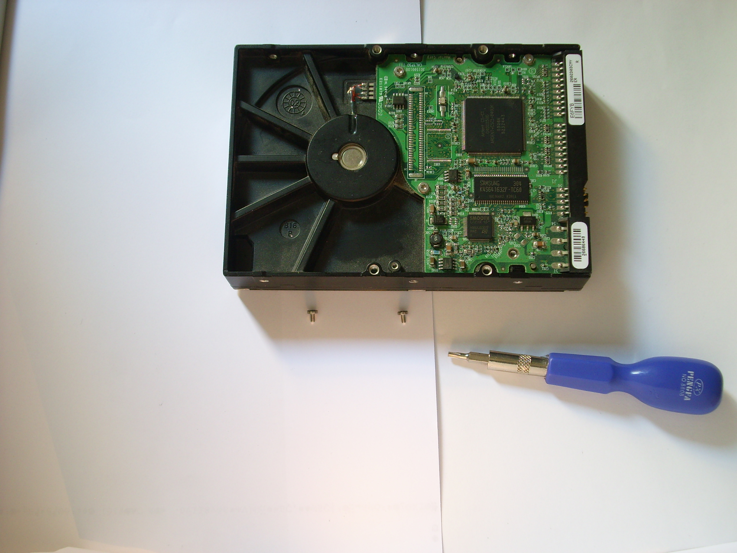 Apertura di un hard disk. Il disco visto dalla parte dell'elettronica.